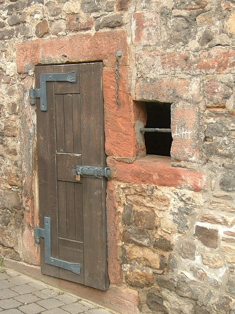 Prangerkette und Türe zum Gefängnis , dem Gehorsam in Frankfurt- Niederursel. Der Pranger datiert laut Türsturz auf das Jahr 1600.